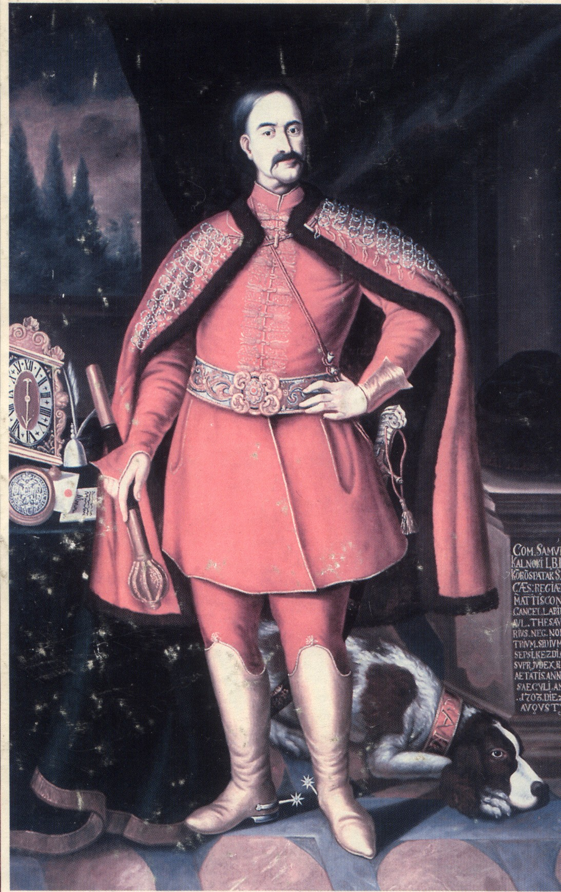 gróf Kálnoky Sámuel 1640-1706 főkapitány, főkirálybíró, Erdély alkancellárja és kincstartója.